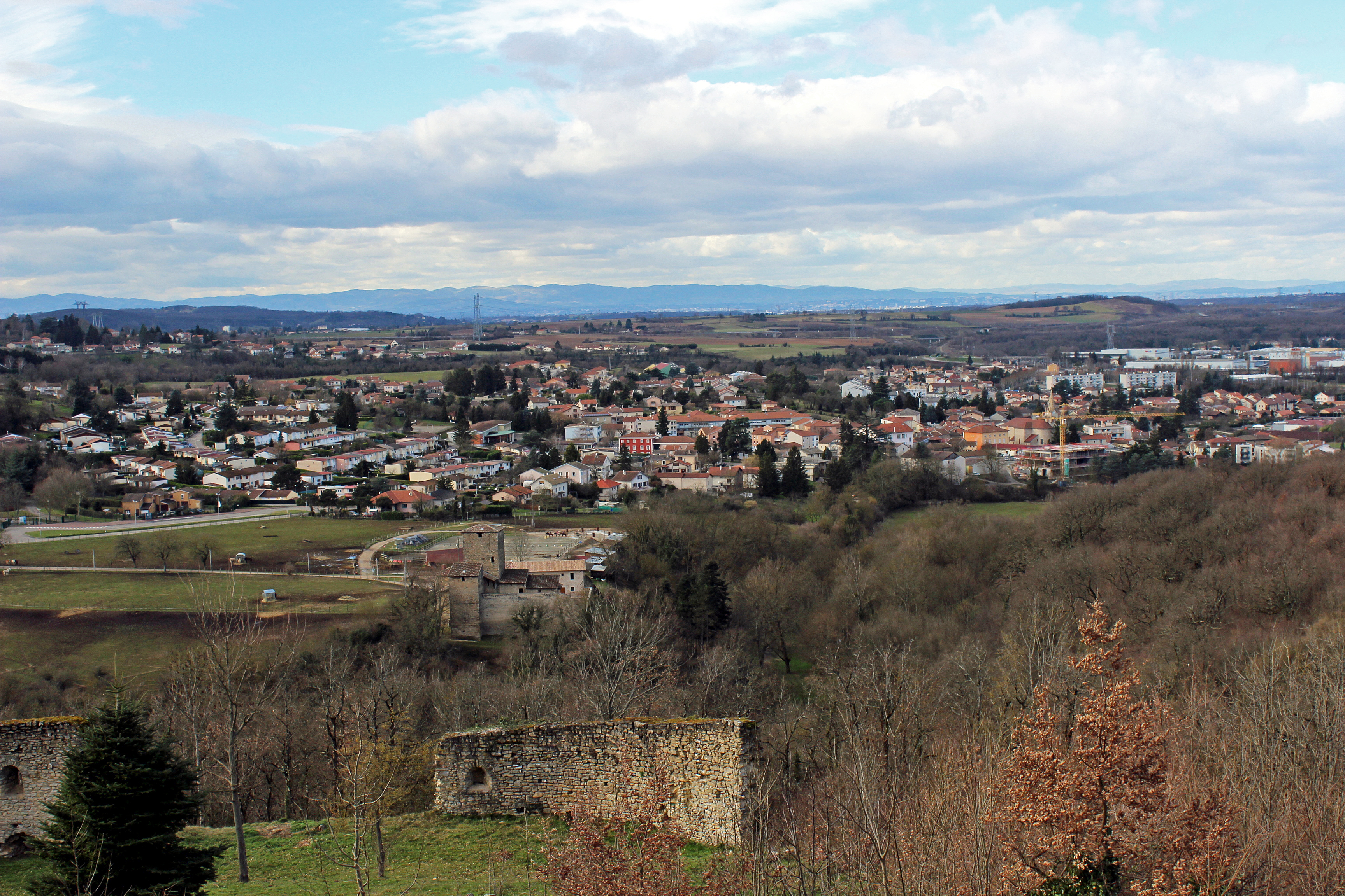 Vue sur Saint-Quentin-Fallavier depuis le château.